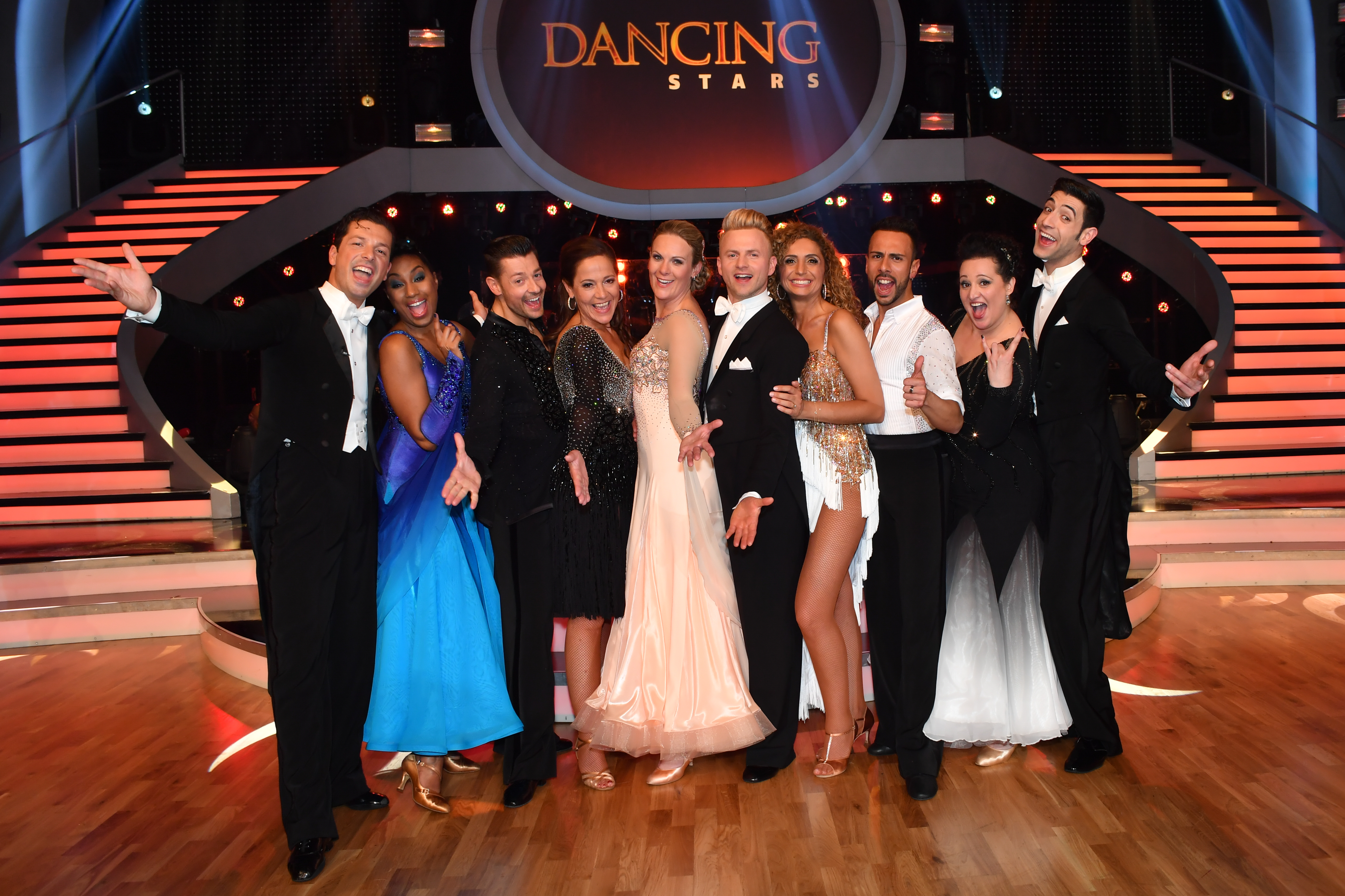 ORF Dancing Stars am 7. April 2017 in Wien. Bild zeigt Gruppenbild der Teilnehmer (Damen).